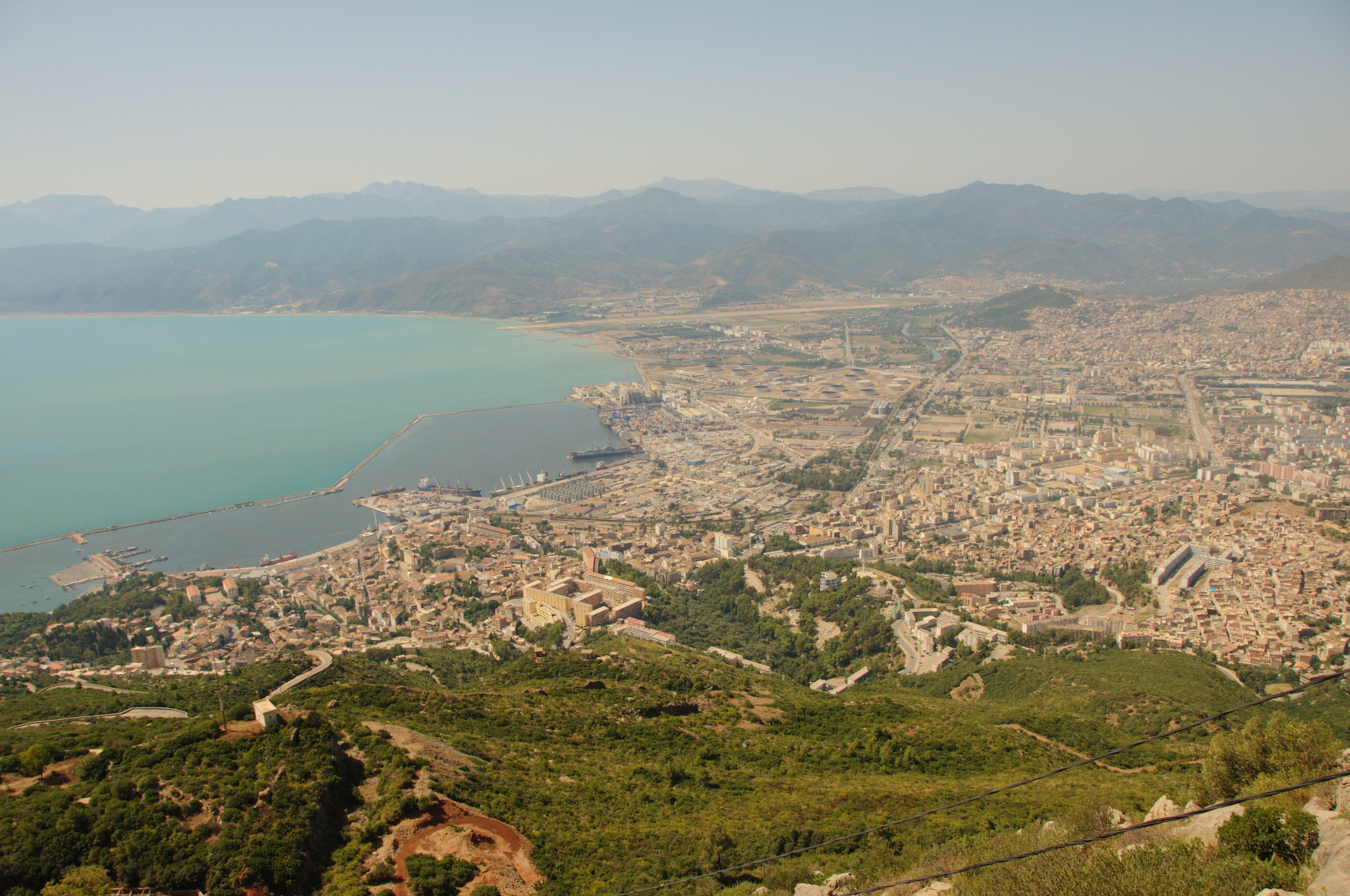 Vue de Béjaïa depuis Yemma Gouraya